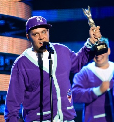 Tede podczas odbierania Superjedynki w Opolu.